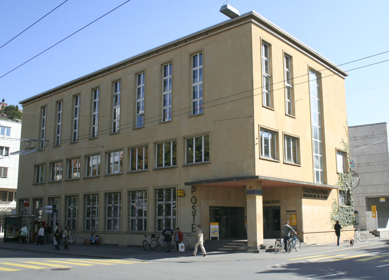 Neumarktpost 1932 - 1934